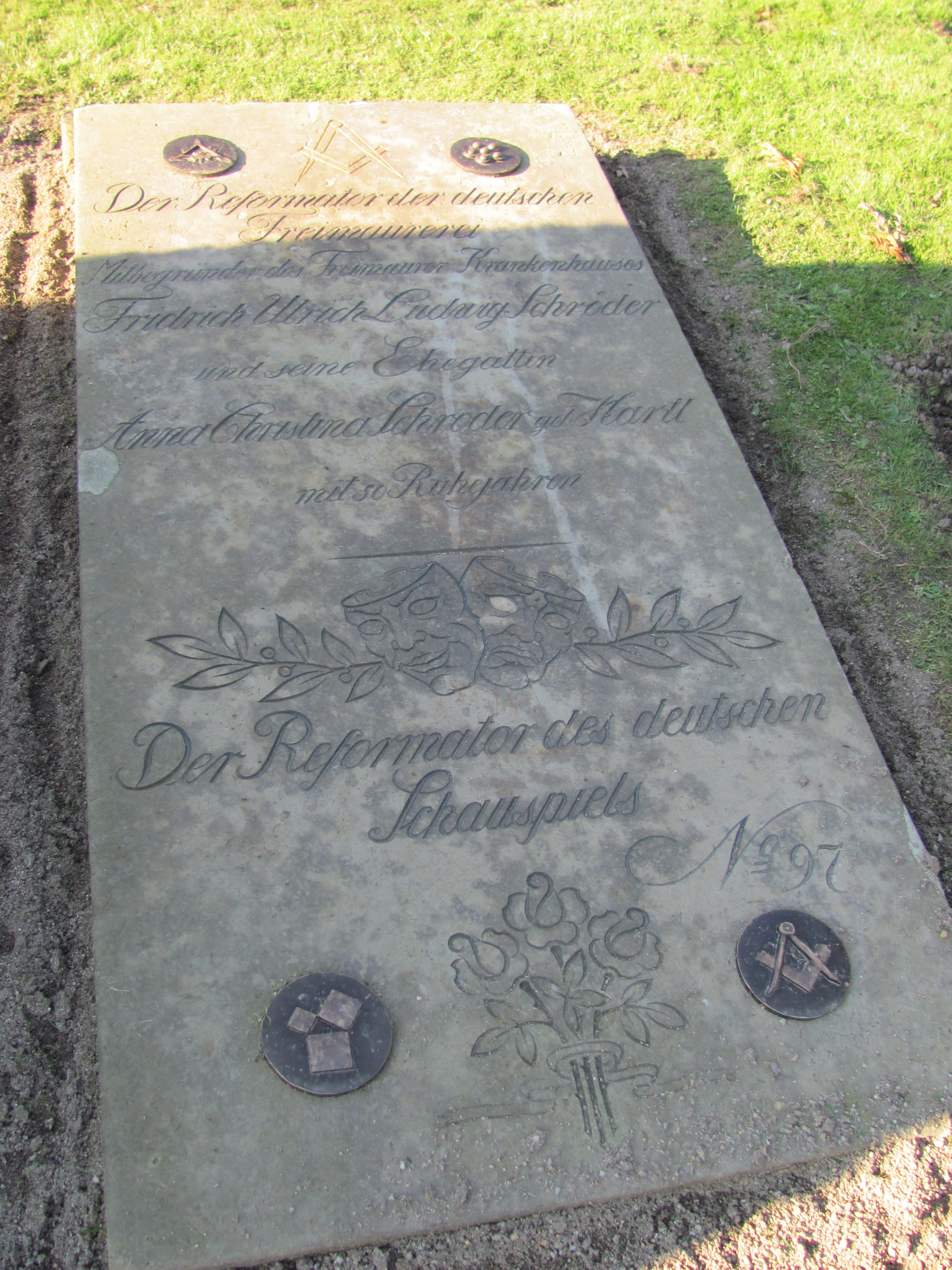 Grab von Friedrich Ludwig Schröder auf dem Althamburgischen Gedächtnisfriedhof auf dem Friedhof Ohlsdorf